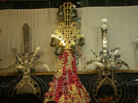 bibi_ka_alam at Alawa-e-bibi